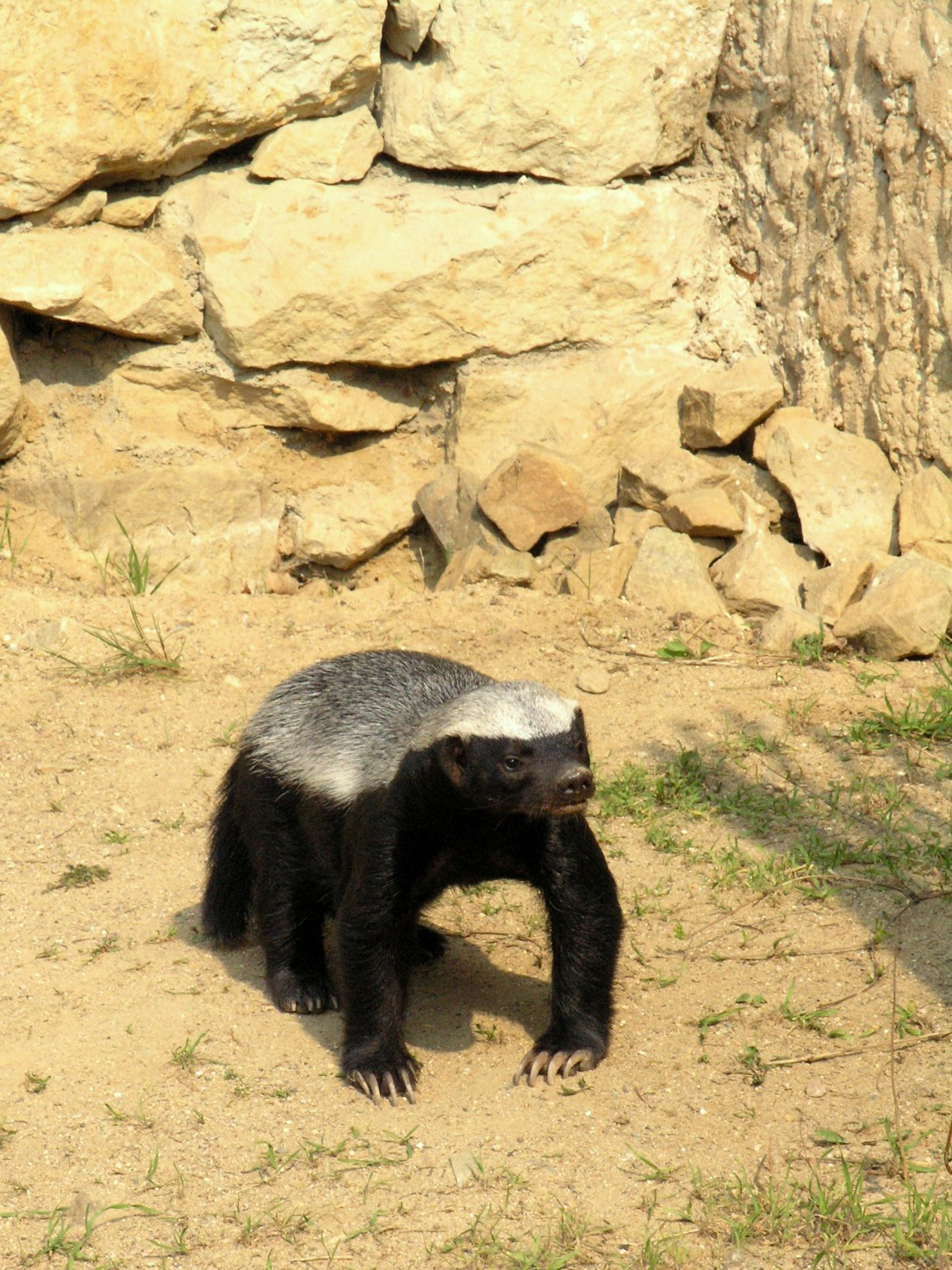 Mellivora capensis (Prague ZOO)